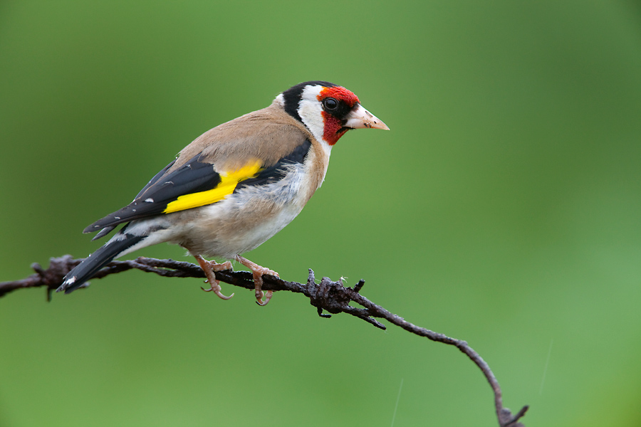 Carduelis carduelis